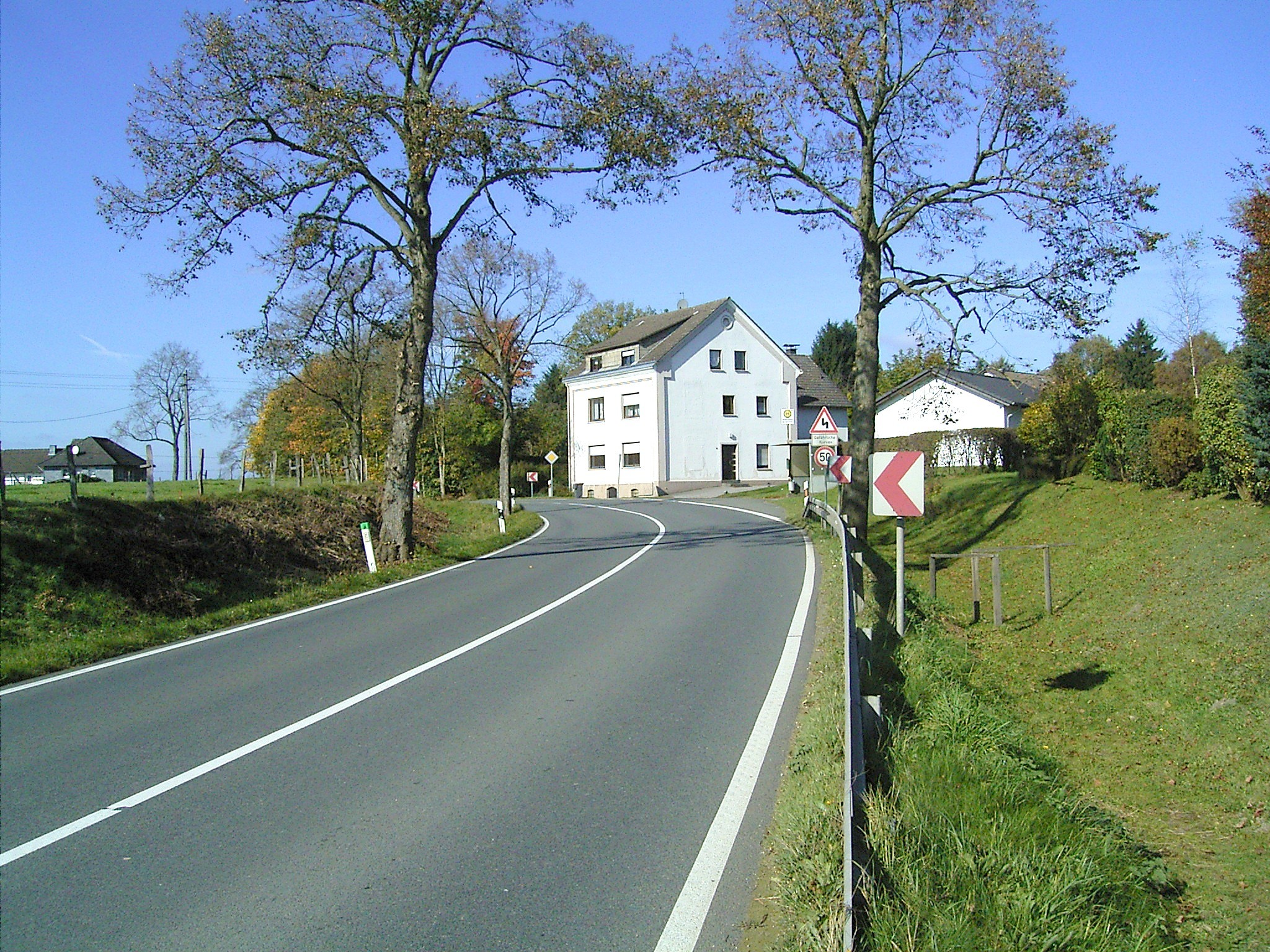 Radevormwald